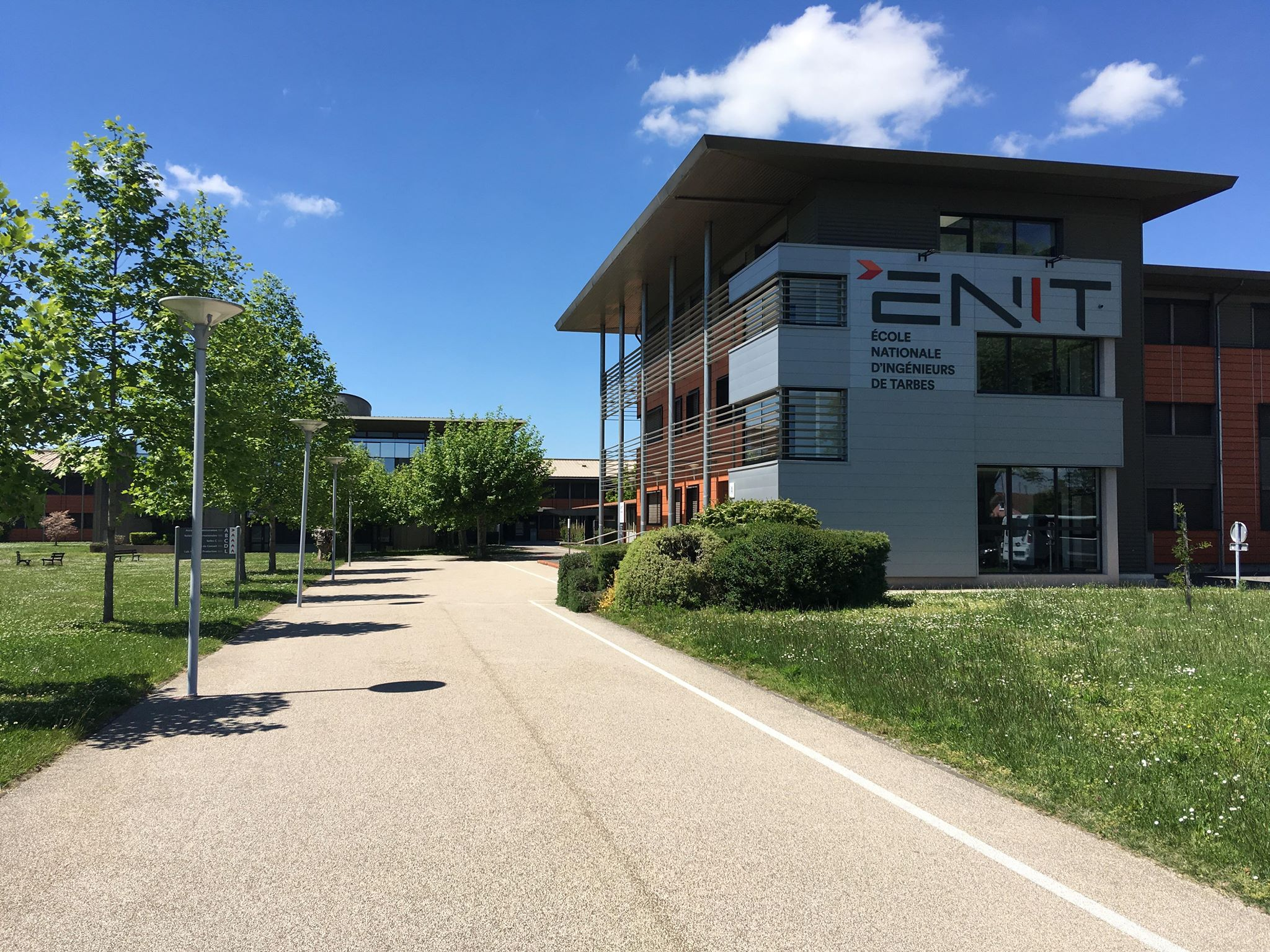 Bâtiment A (administration) de l'ENIT avec le nouveau logo datant 2017.